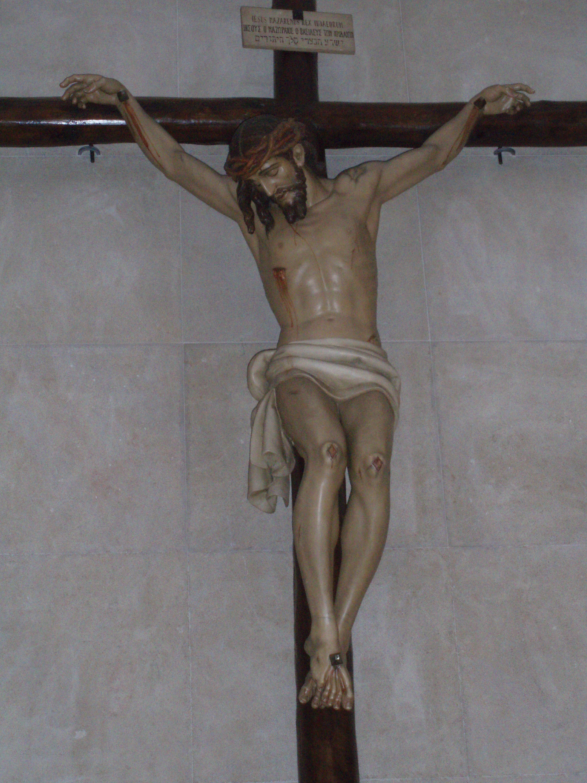 Crist de la Bona Mort de Gandia (1957), de Josep Rausell Sanchis